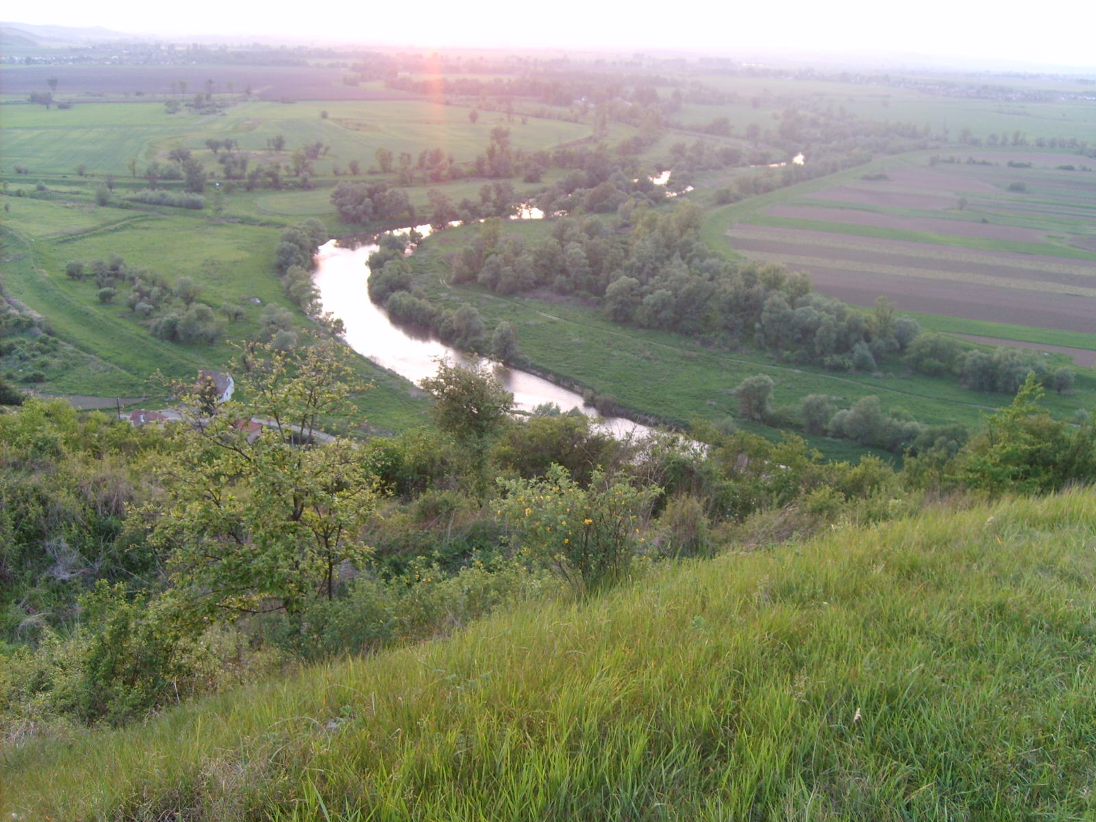 A Sajónémeti Várhegyről a Sajó látképe.